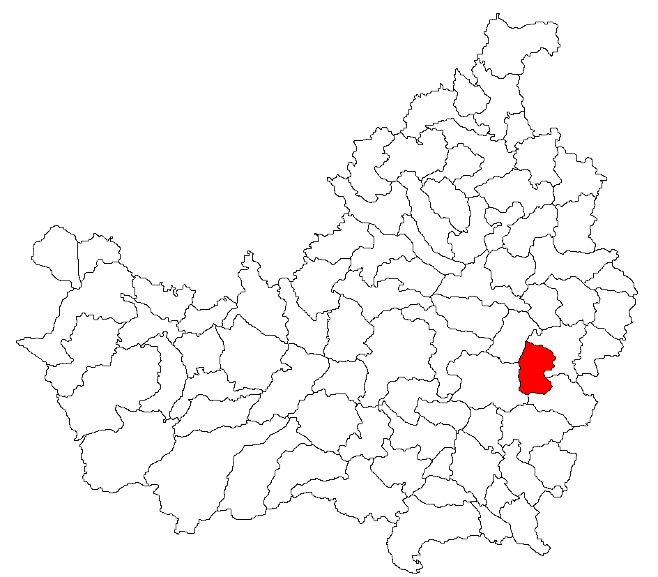 Categorie:Hărţi ale judeţului Cluj